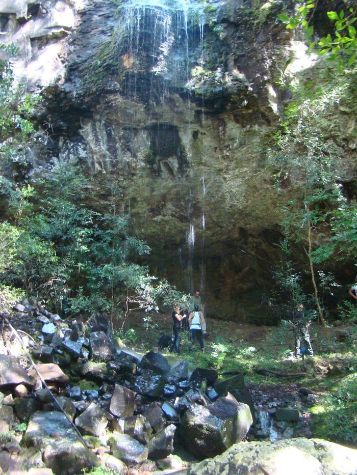 Cascada del Indio, Valle del Lunarejo, Rivera, Uruguay.